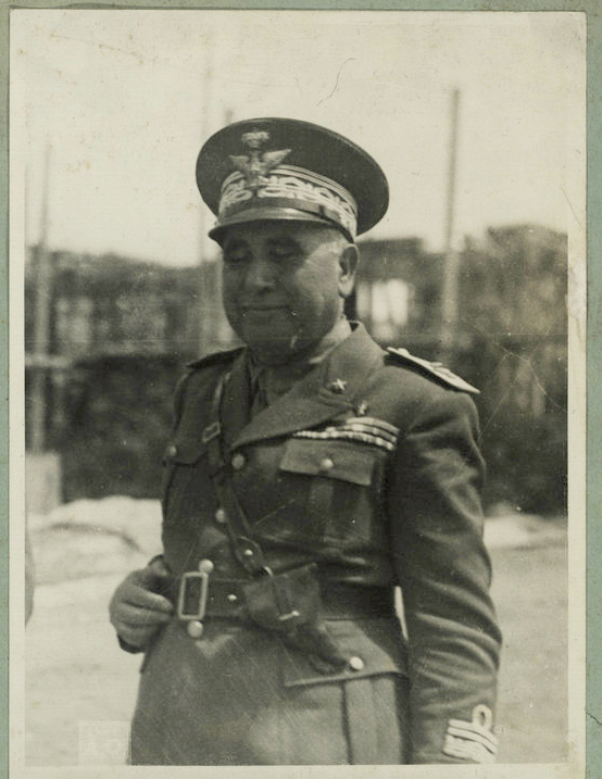 S.E. il generale Ruggero Santini comandante il I corpo d'armata